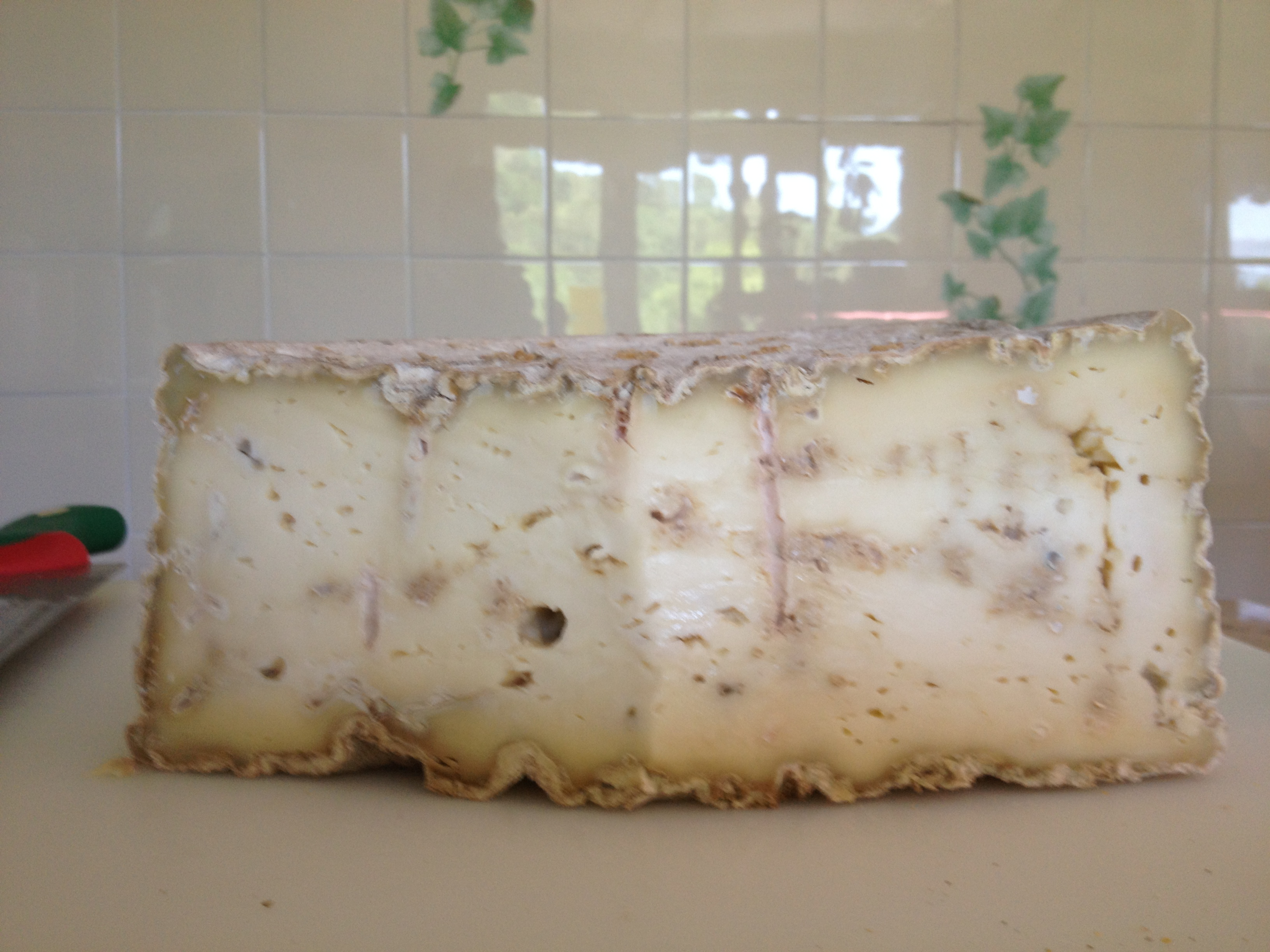 Forma (vista interna) di Strachitunt DOP. Val Taleggio (BG)-Italia